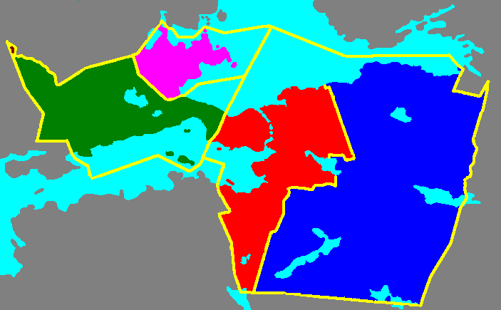 Tampere borders 1937-1950. (Sources:[1] & Iltanen, Jussi, 2004, Urbes Finlandiae, Suomen kaupunkien historiallinen kartasto, Genimap Oy, ISBN 951-593-915-1